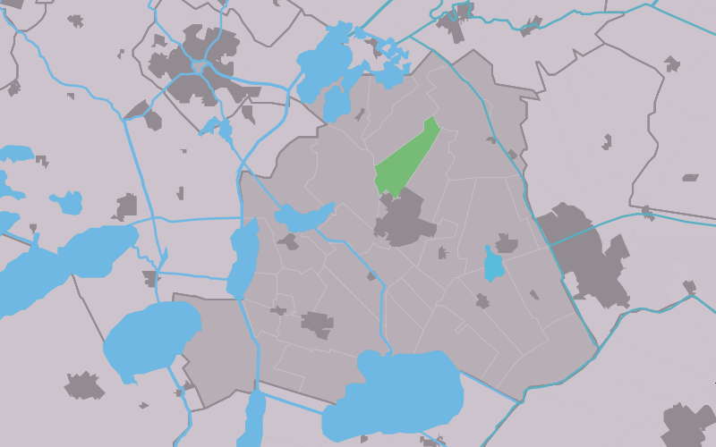 Kaartsje fan himrik fan Sniksweach